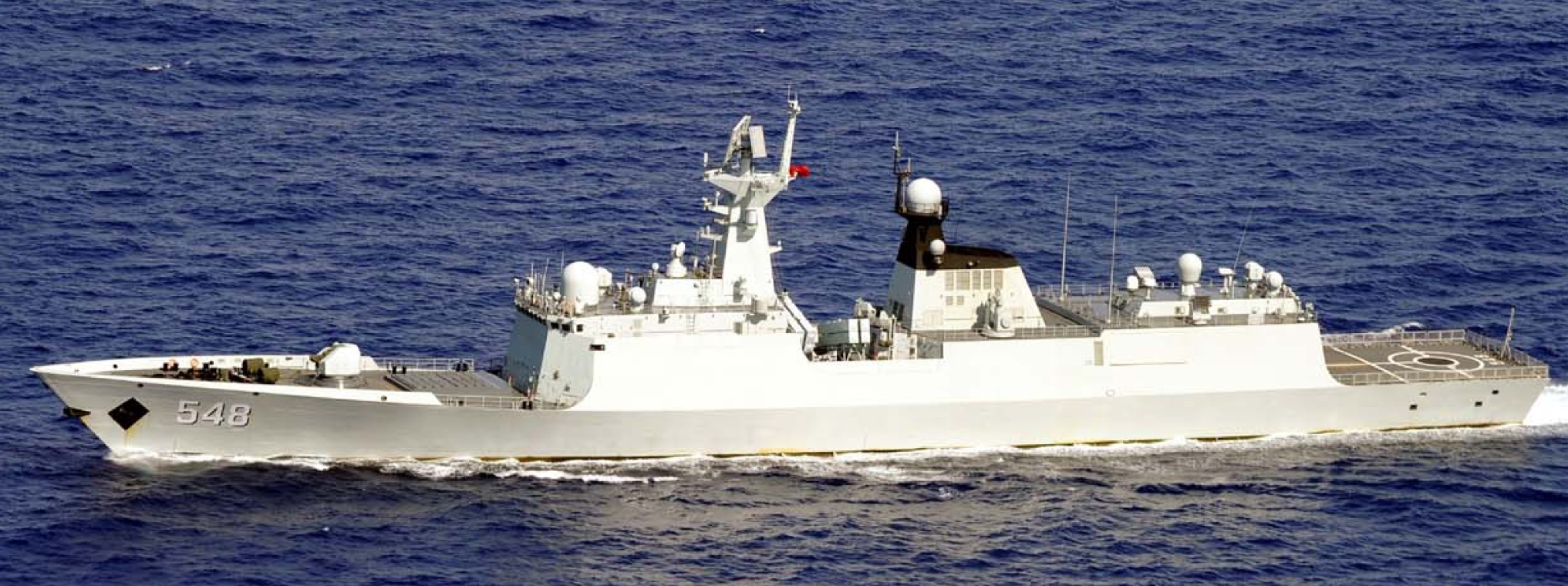 ９月８日（日）午後１１時頃から９日（月）午前２時頃にかけて、海上自衛隊第１１護衛隊「やまゆき」（横須賀）及び第５航空群所属「Ｐ－３Ｃ」（那覇）が、宮古島の北東約１００ｋｍの海域を太平洋から東シナ海に向けて北西進する中国海軍ジャンカイⅡ級フリ ゲート２隻を確認した。